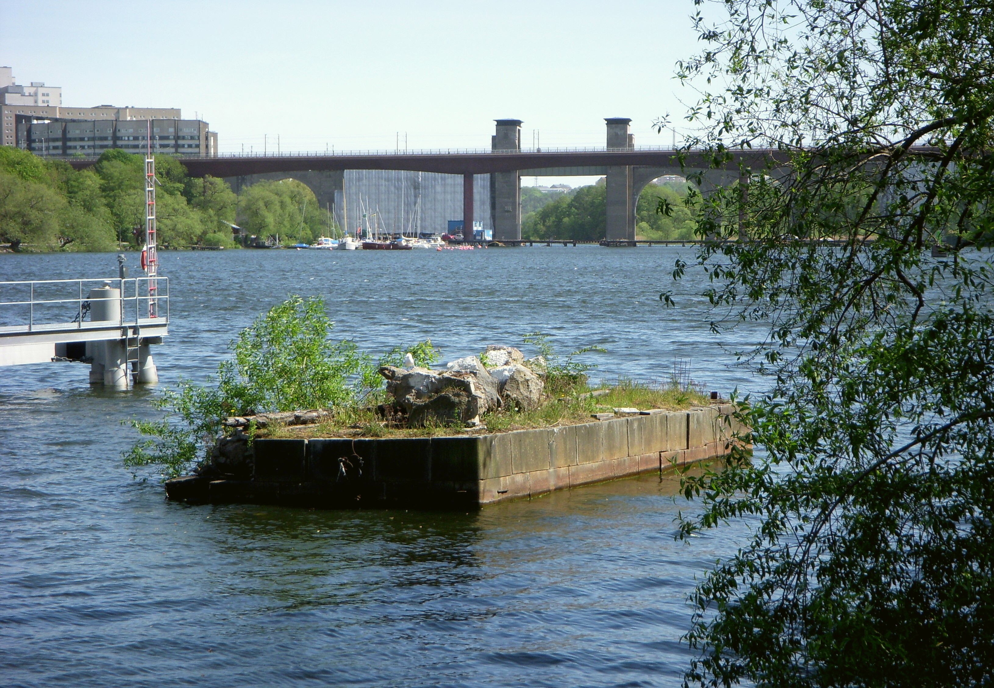 Liljeholmebron i Stockholm, gamla brofundamentet, Årstabron i bakgrunden